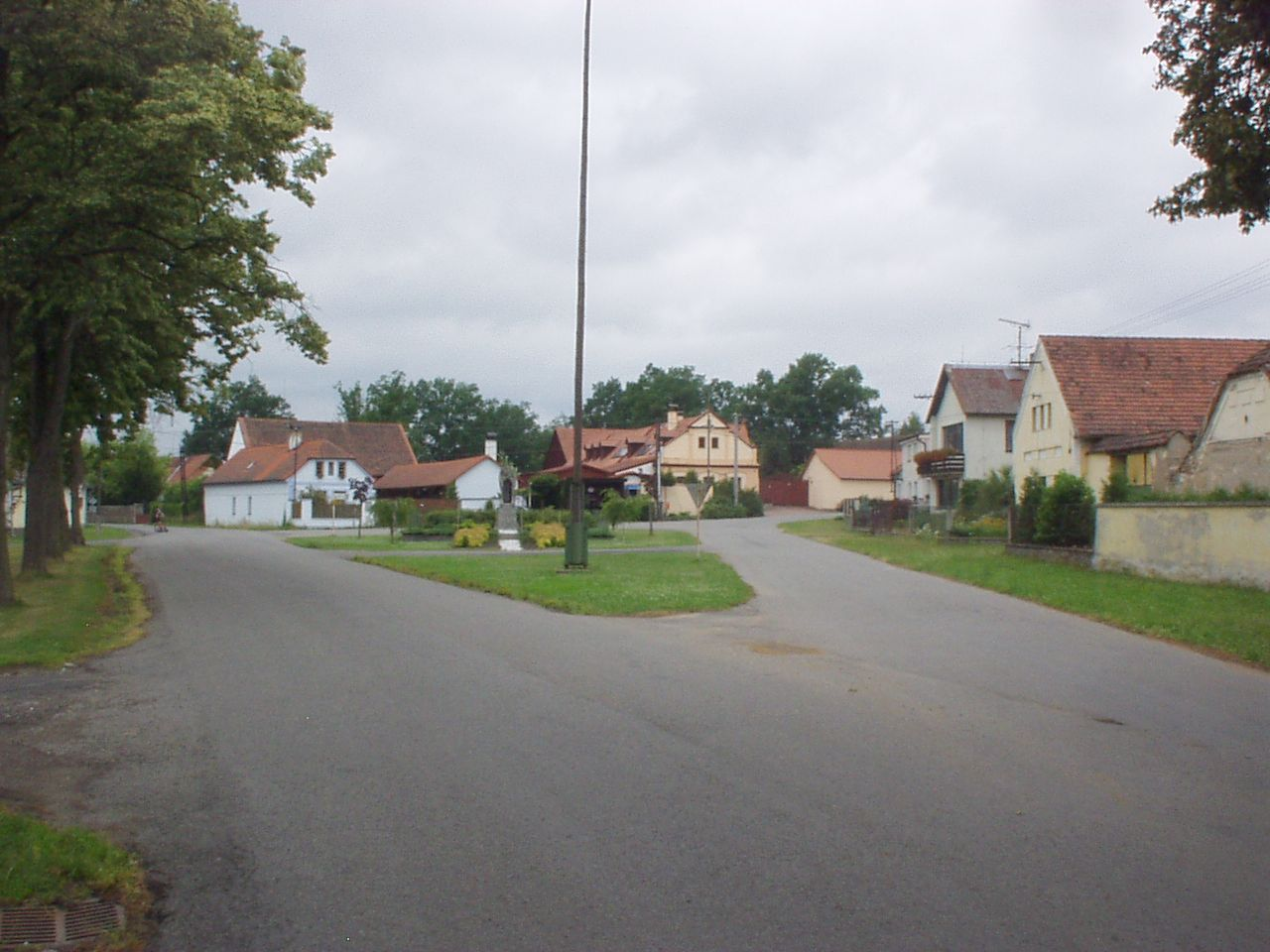 náves v Buzicích